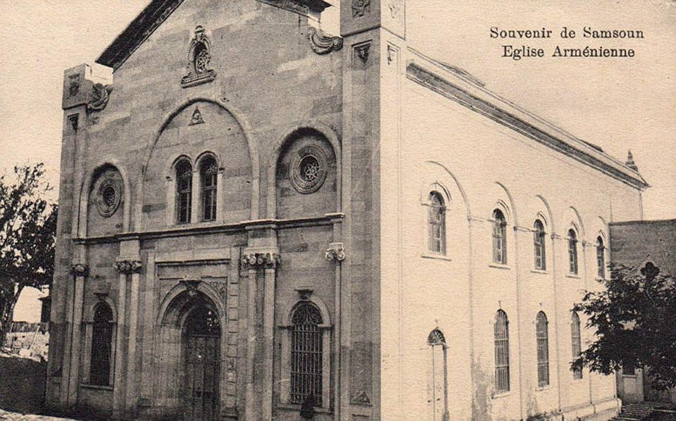 Canik Surp Nigoğayos Ermeni Kilisesi'nin nadir fotoğraflarından birisi.